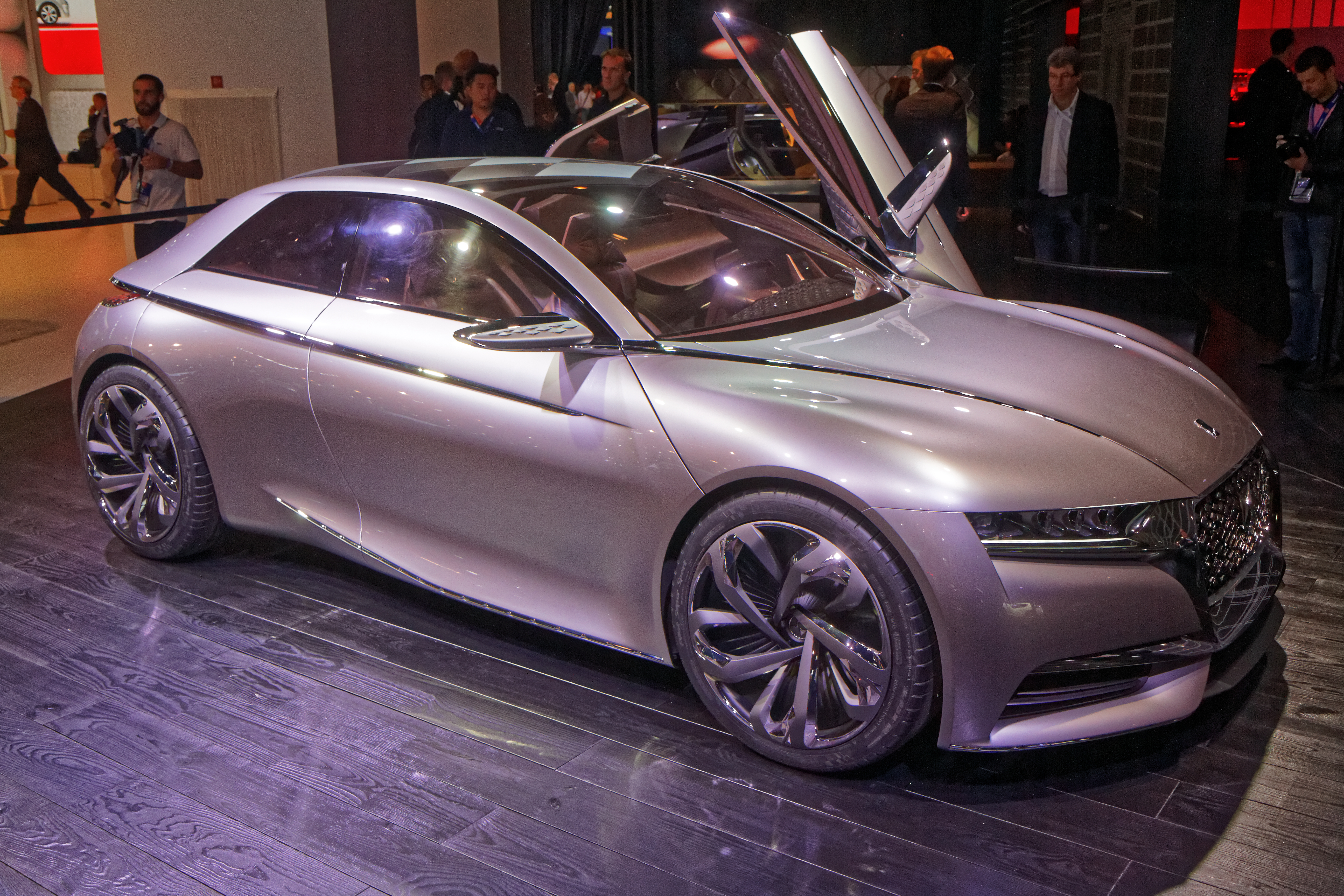 Une Citroën DS Divine présentée lors du mondial de l'automobile de Paris 2014.